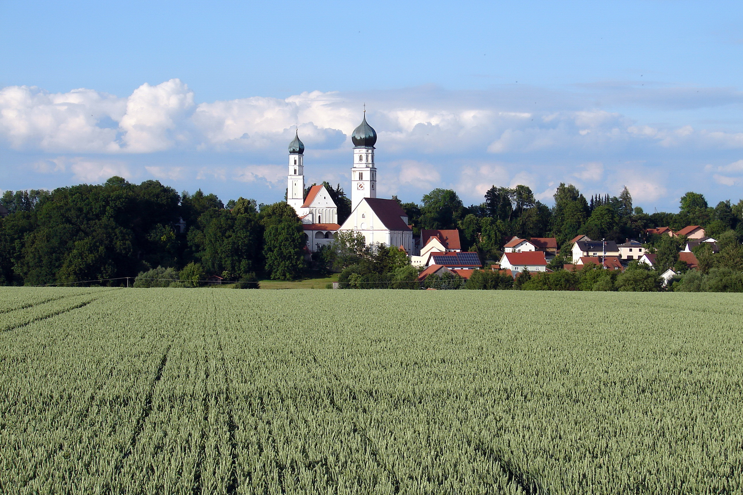 Ensemble Kirchengruppe Haindling